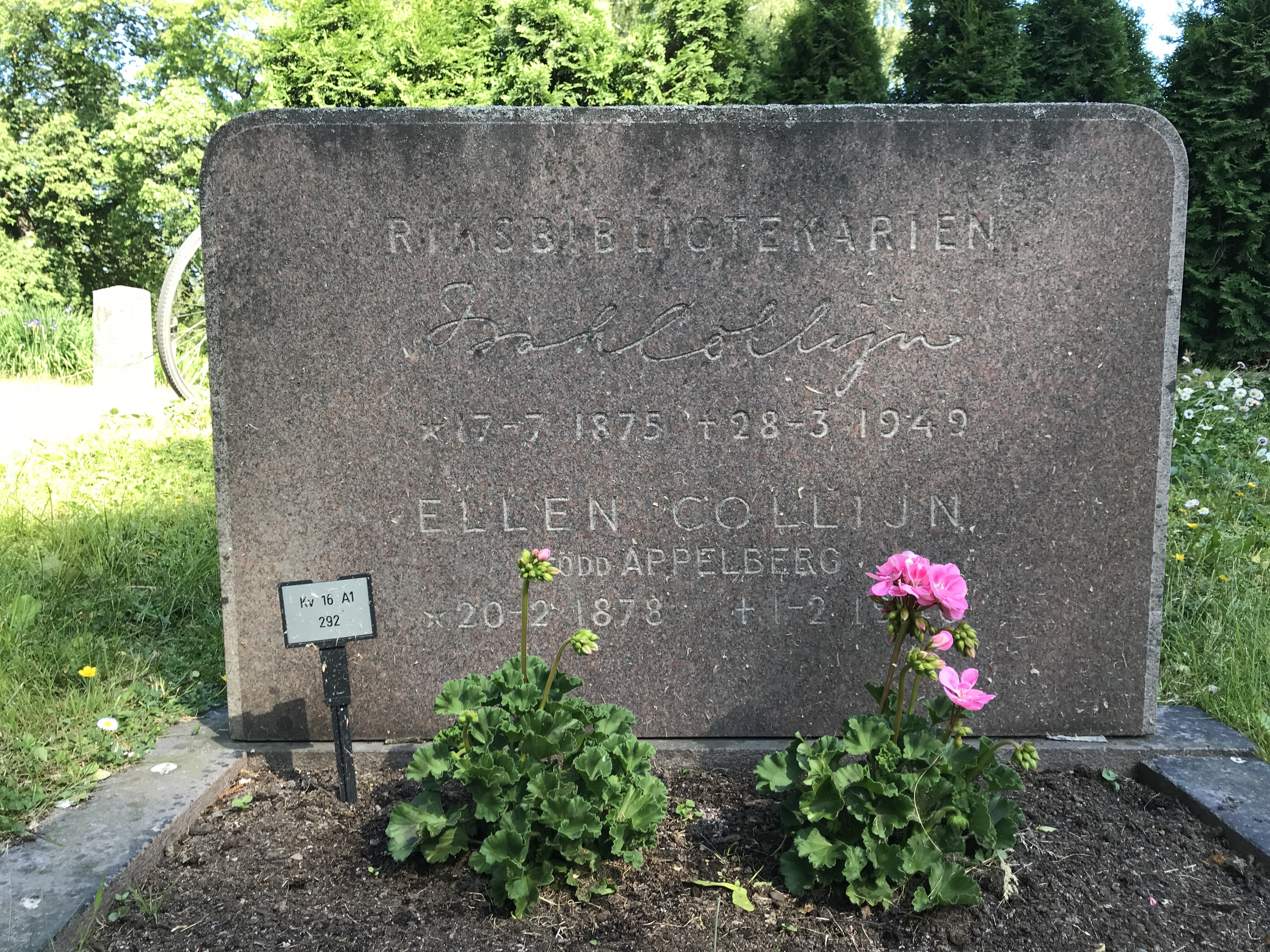 Kv 16 A1 292